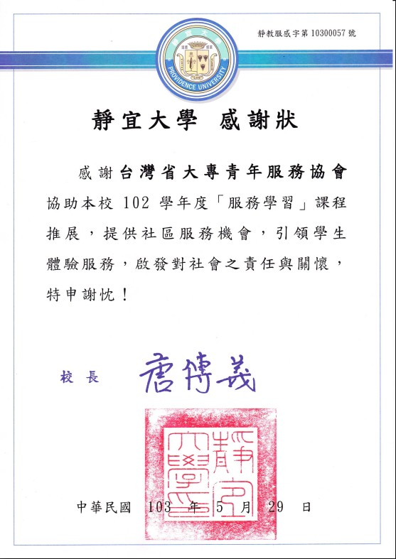 靜宜大學於民國103年頒發給台灣省大專青年服務協會的感謝狀